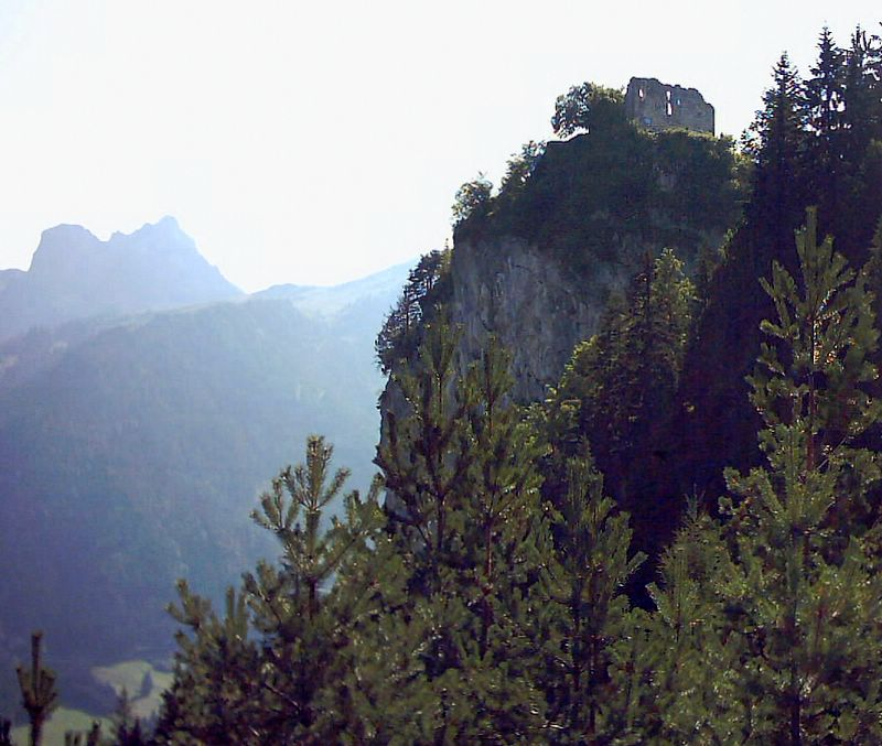 Burg Falkenstein bei Pfronten (Allgäu, Bayern). Ansicht von Osten. Eigene Aufnahme, Sommer 2004 / Falkenstein castle near Pfronten (Bavaria, Germany). View from east. Own photo, Summer 2004